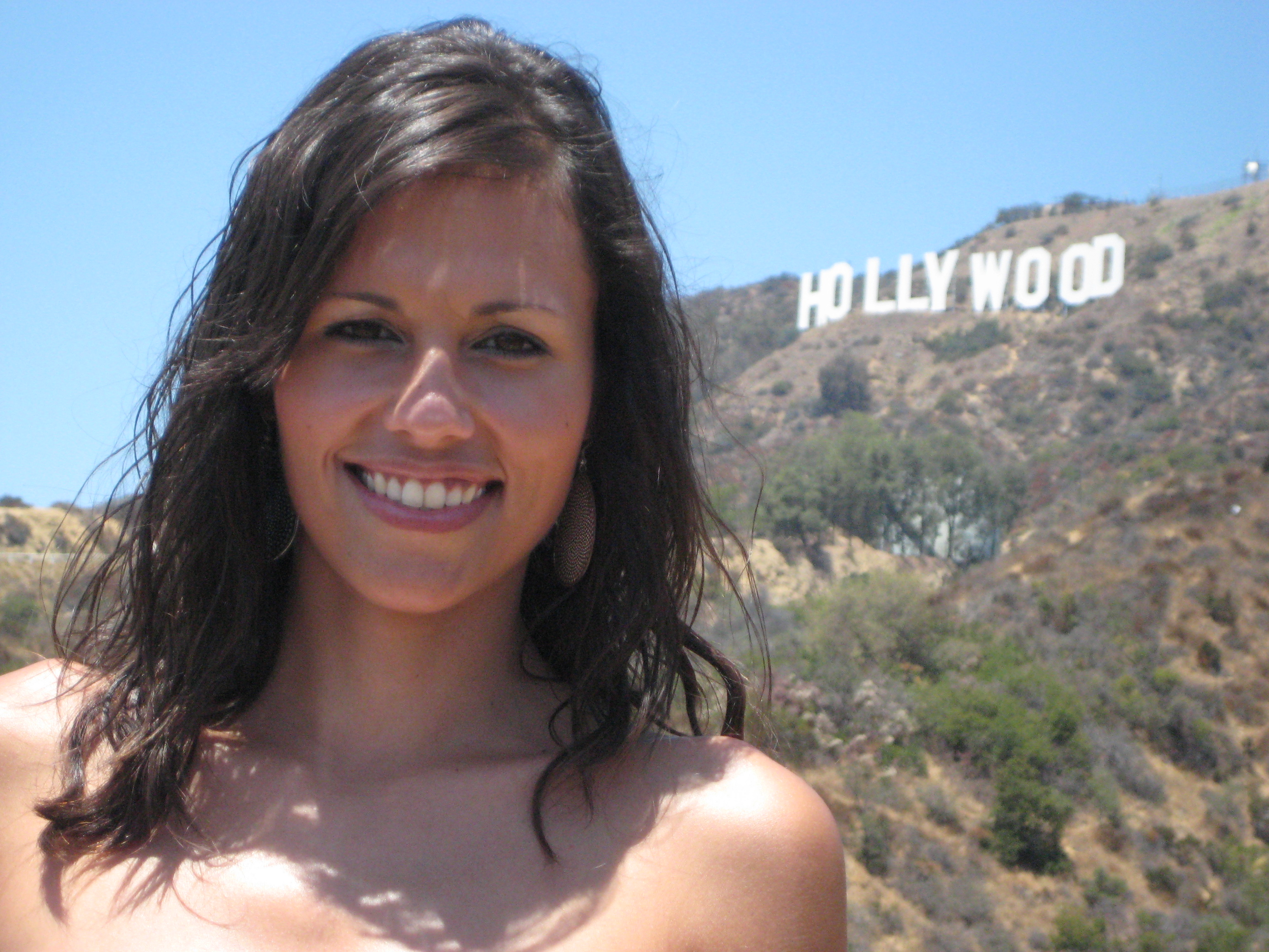 Estela Giménez en Los Angeles durante la grabación de un reportaje de Insert Coin.